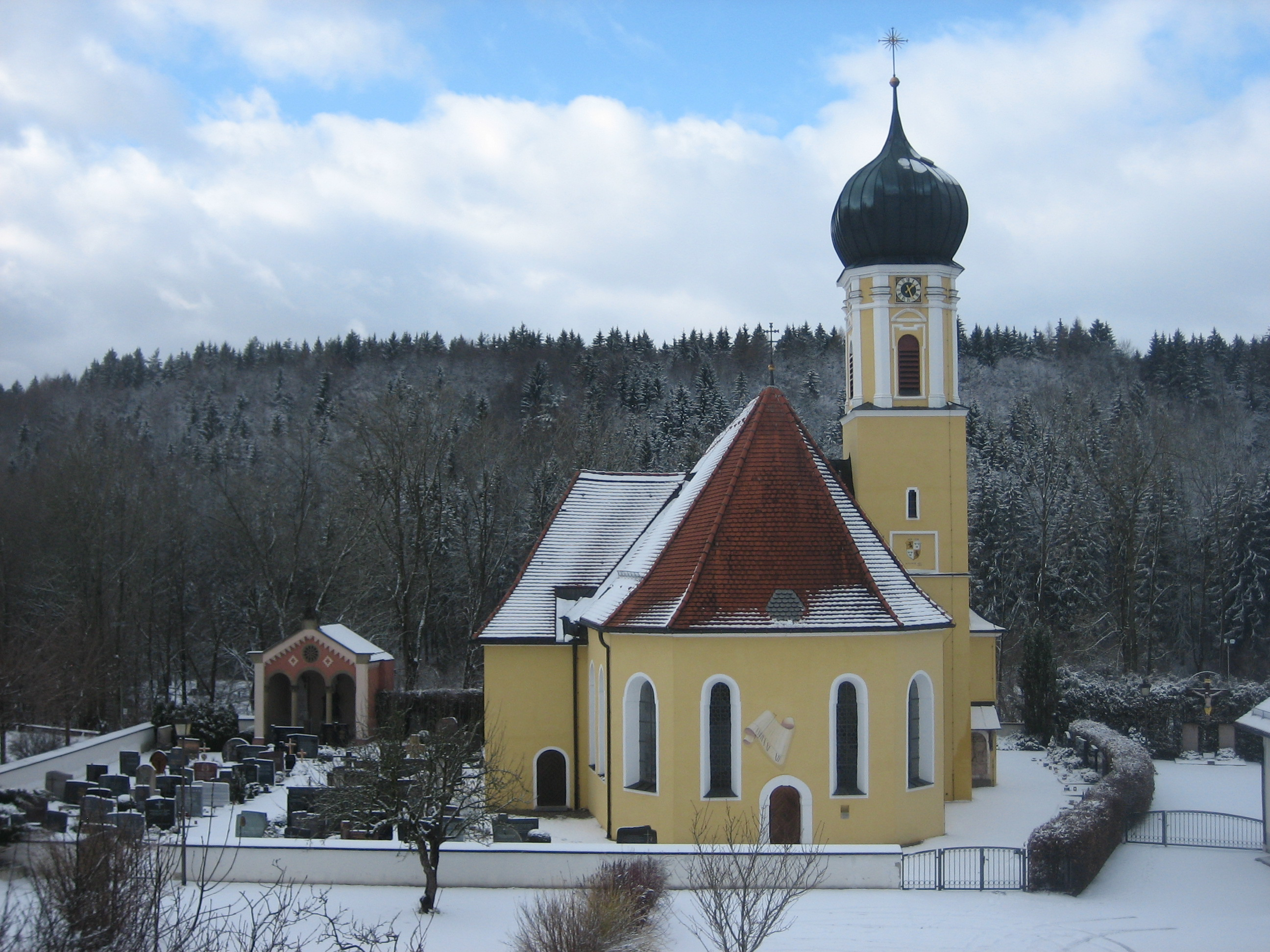 St. Peter und Paul, Lautrach, Landkreis Unterallgäu, Bayern